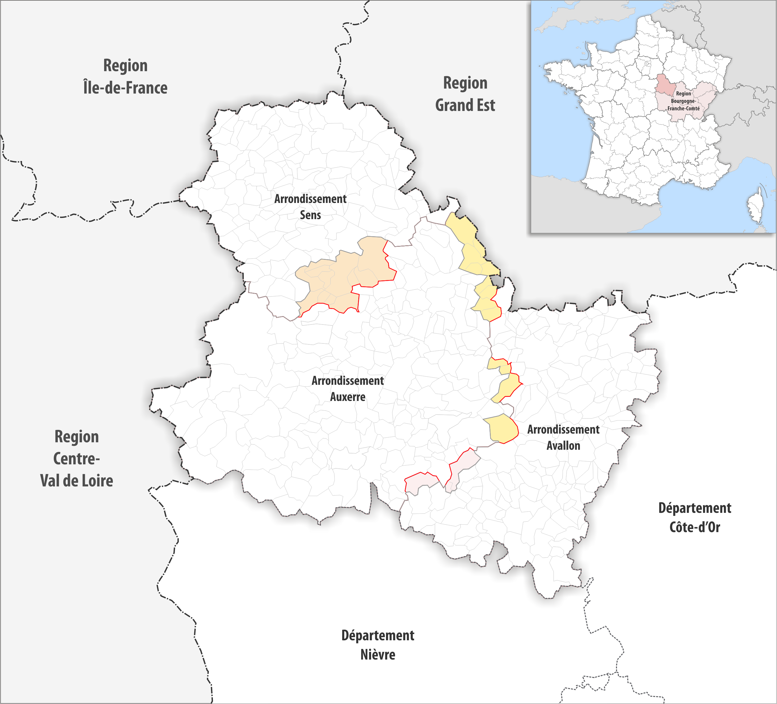 Arrondissements Anpassungen auf 2017 im Departement Yonne